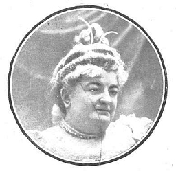 Retrato de Emilia Pardo Bazán, publicado en la revista española Actualidades.